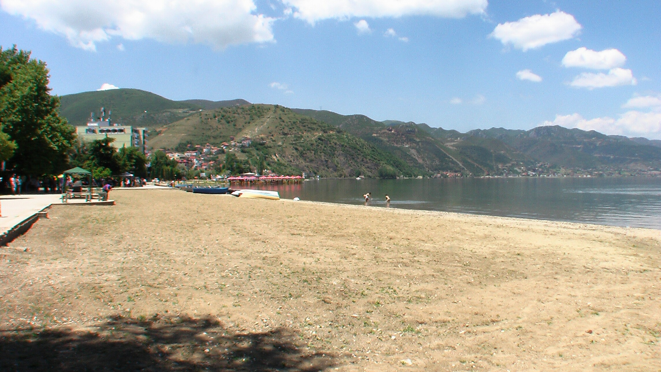 PogradecStrand